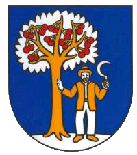 Erb obce Visnove pri Ziline